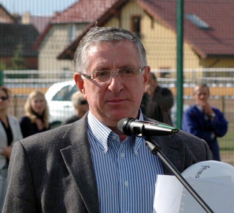 Lesław Ćmikiewicz podczas otwarcia Orlika w Wolinie w 2009 roku.